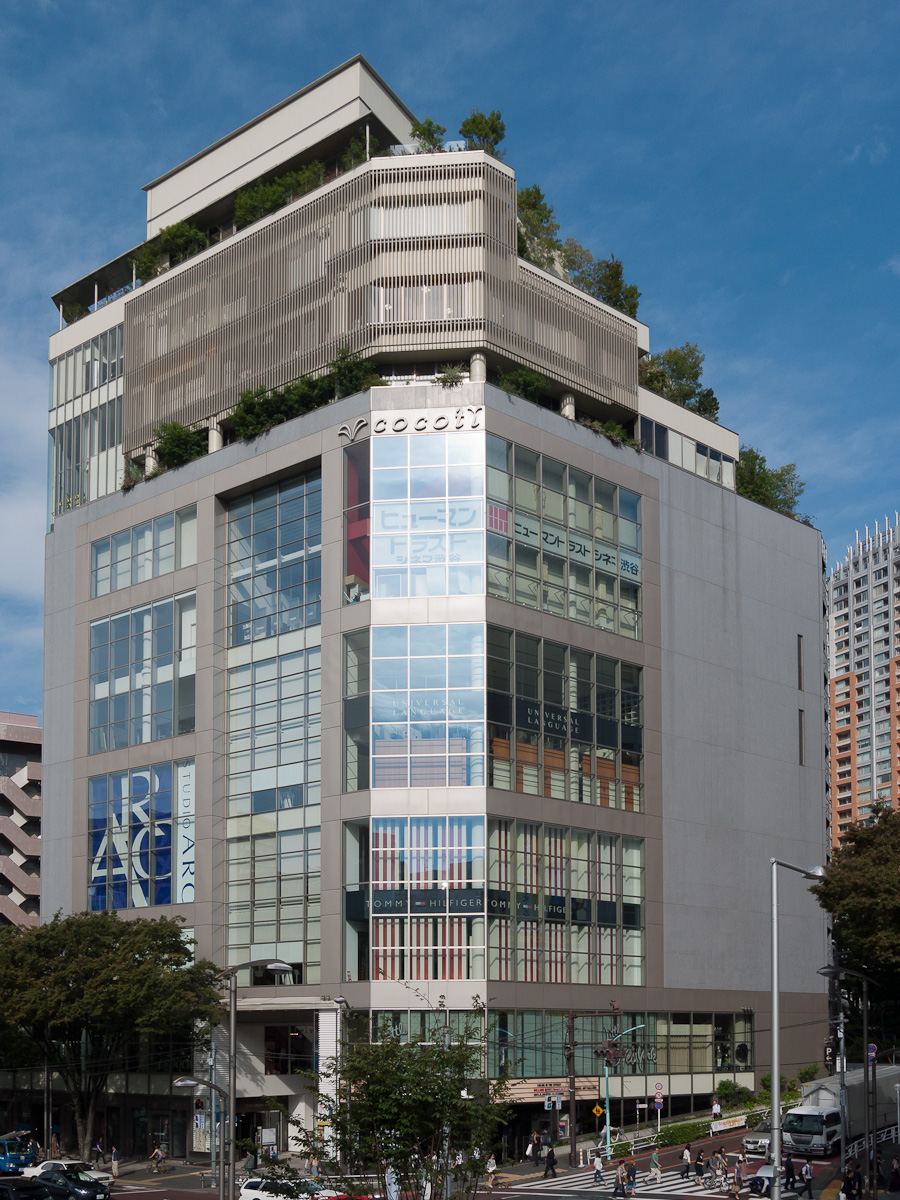 "Cocoti"渋谷。東京都渋谷区渋谷1丁目。